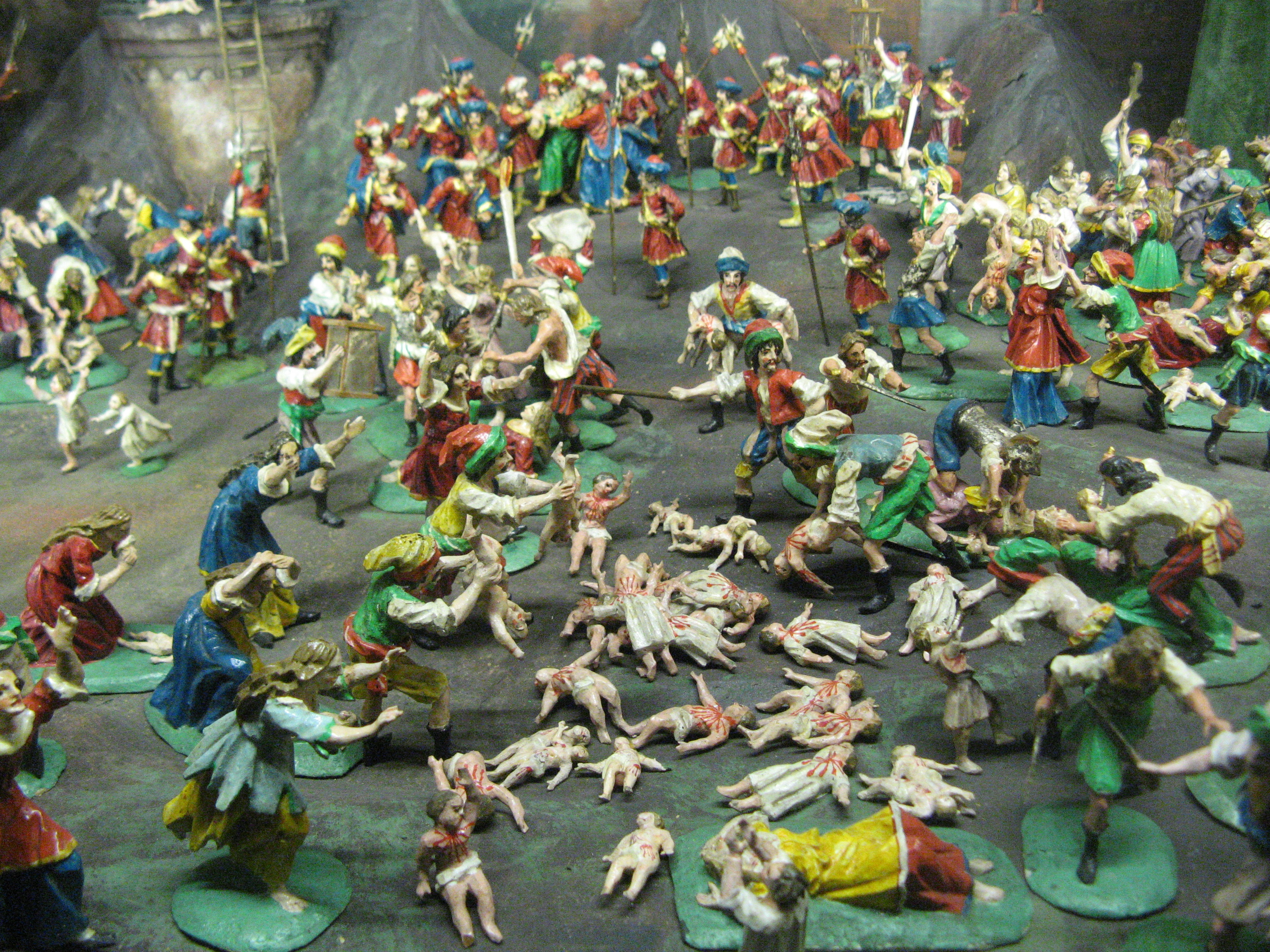 Augustin Alois Probst:Bethlehemitischer Kindermord, Krippenmuseum Brixen